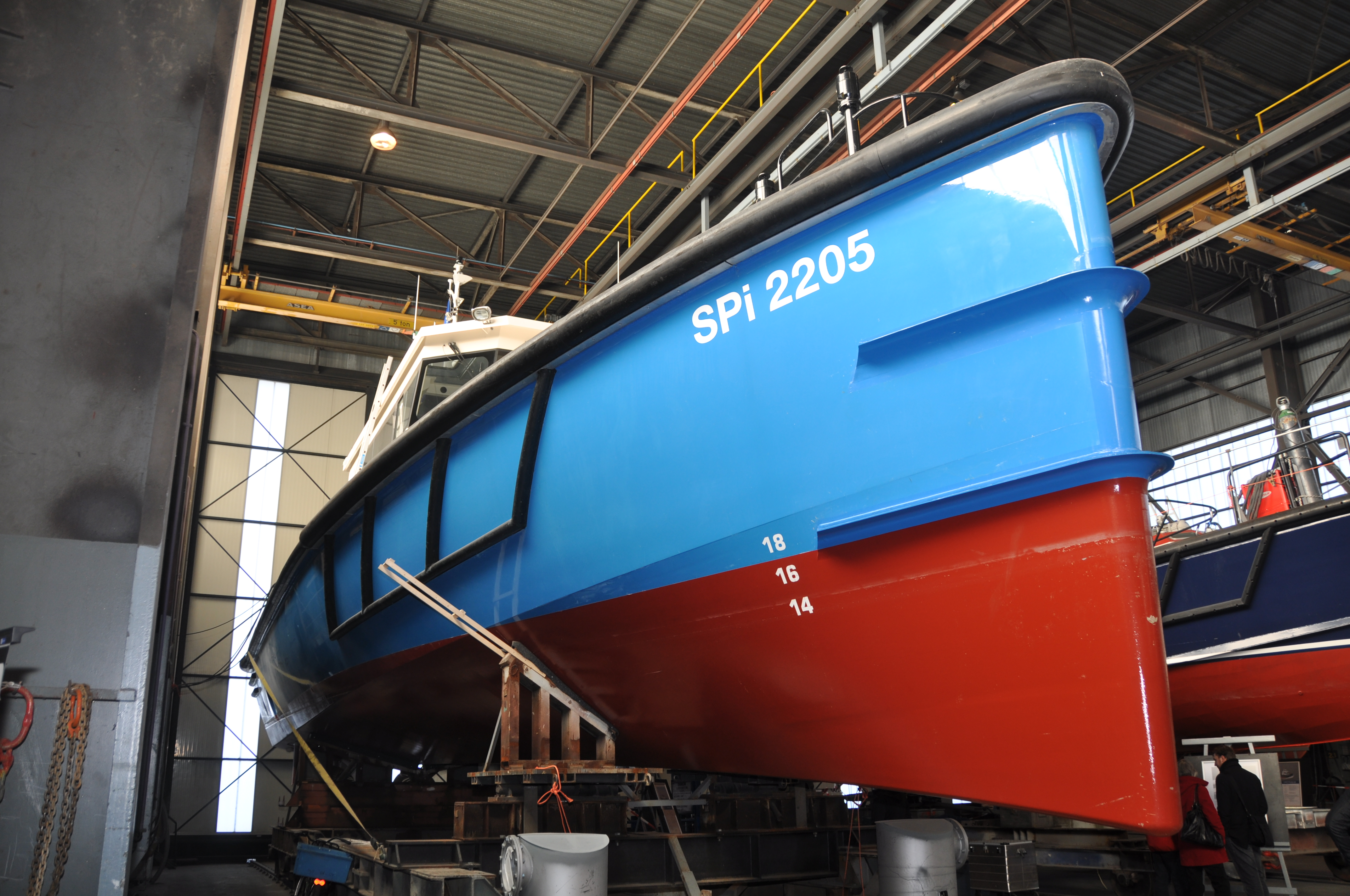 Een SPi 2205, een Damen Stan Pilot 2205 bij de afbouw op de werf in Gorinchem .